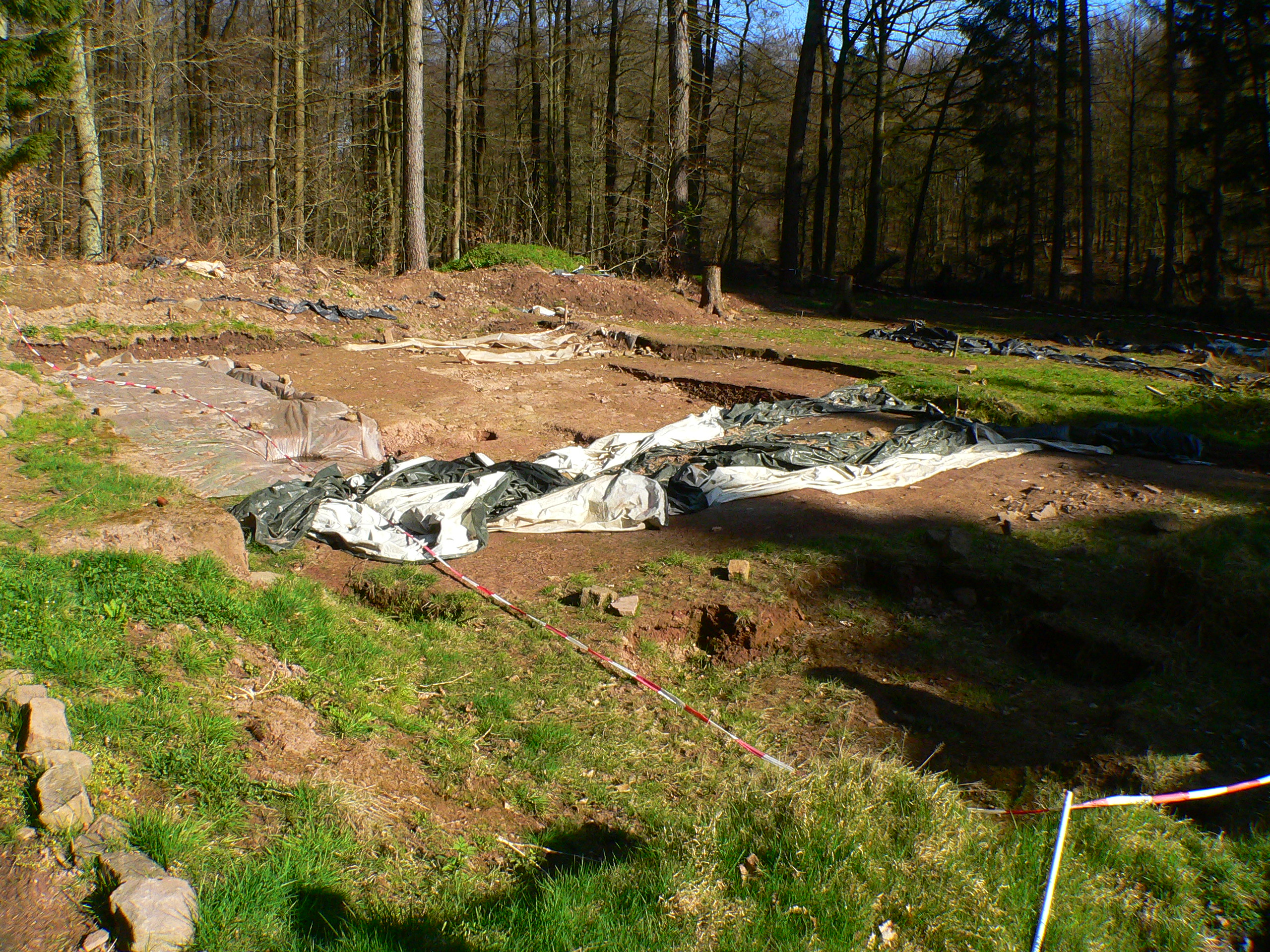 Wüstung Schmeessen im Solling